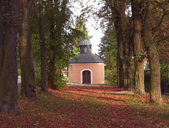 Gedaechniskapelle Schloss Fronberg